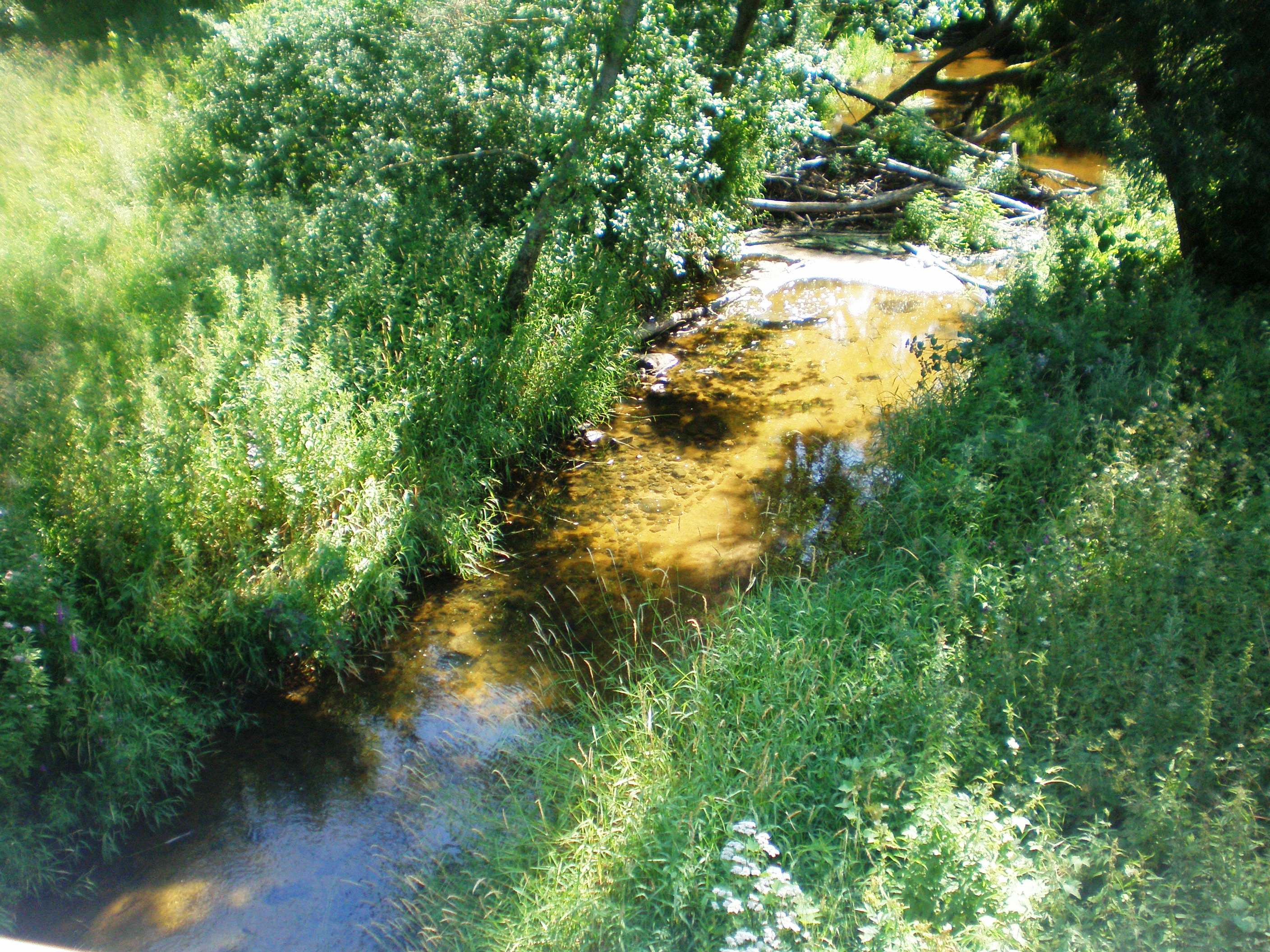 Liaudė river, Lithuania